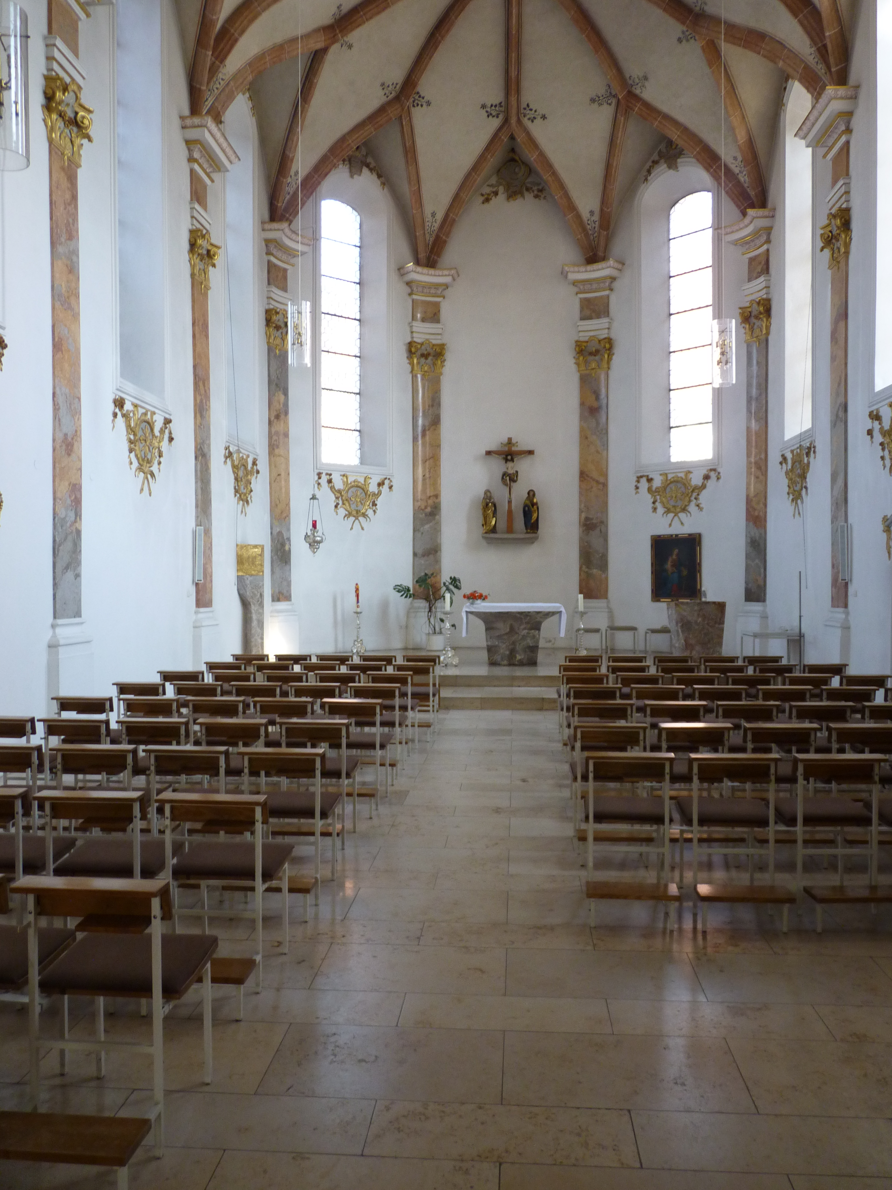 Auch ein Teil der Wengenkicrhe, die kleine Kirche. Sie liegt im östlichen Teil der Kirche und hat zwei Zugänge, einmal einen separaten durch den Innenhof und einen anderen östlich vom Altar der großen Kirche.